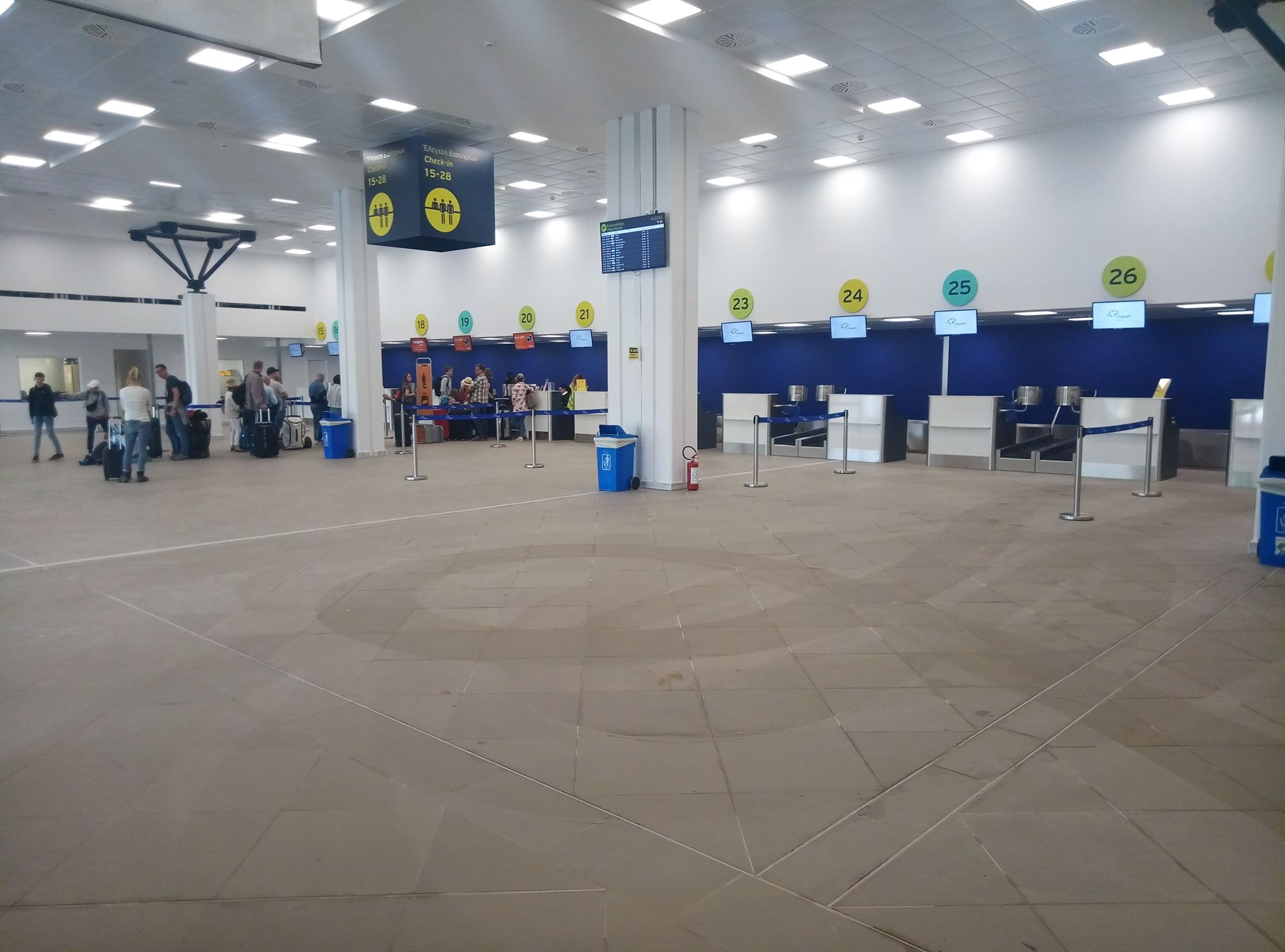 Ανακαινισμένος αεροσταθμός στο αεροδρόμιο της Κέρκυρας